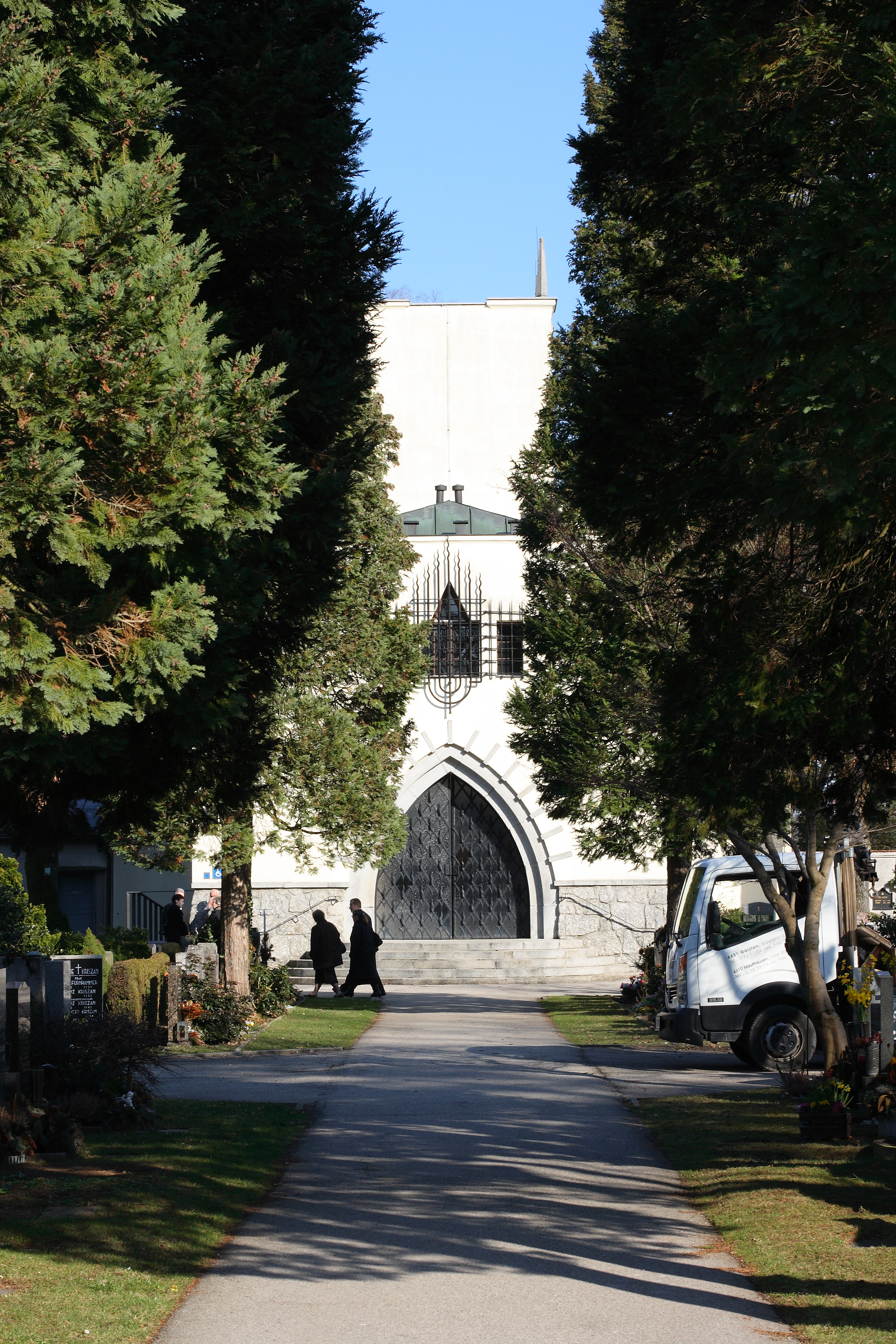 Krematorium mit Verabschiedungshalle am Steyrer Urnenfriedhof